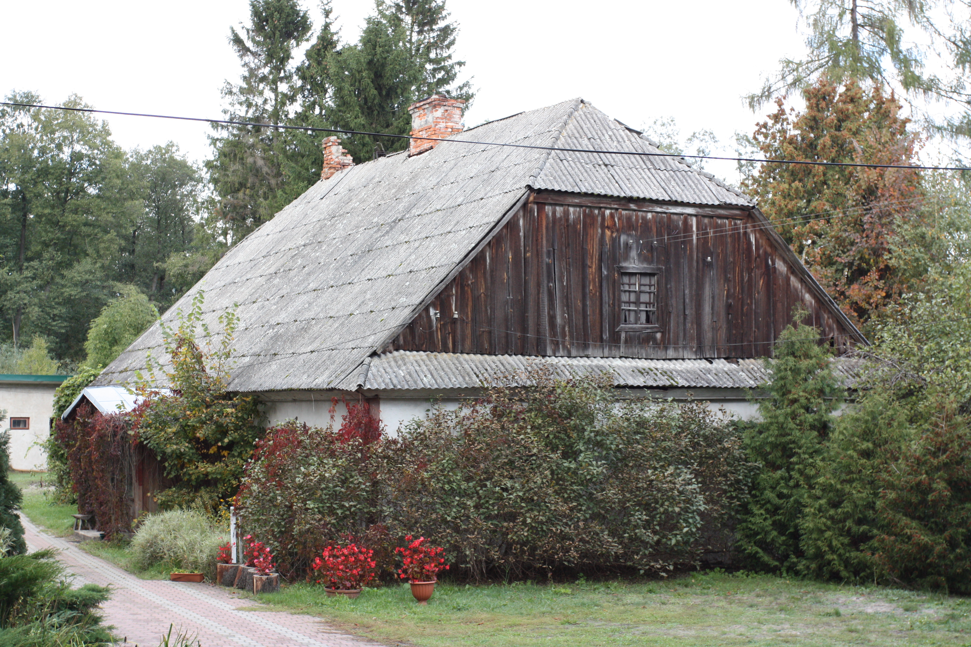 Sadowne, plebania, 1828